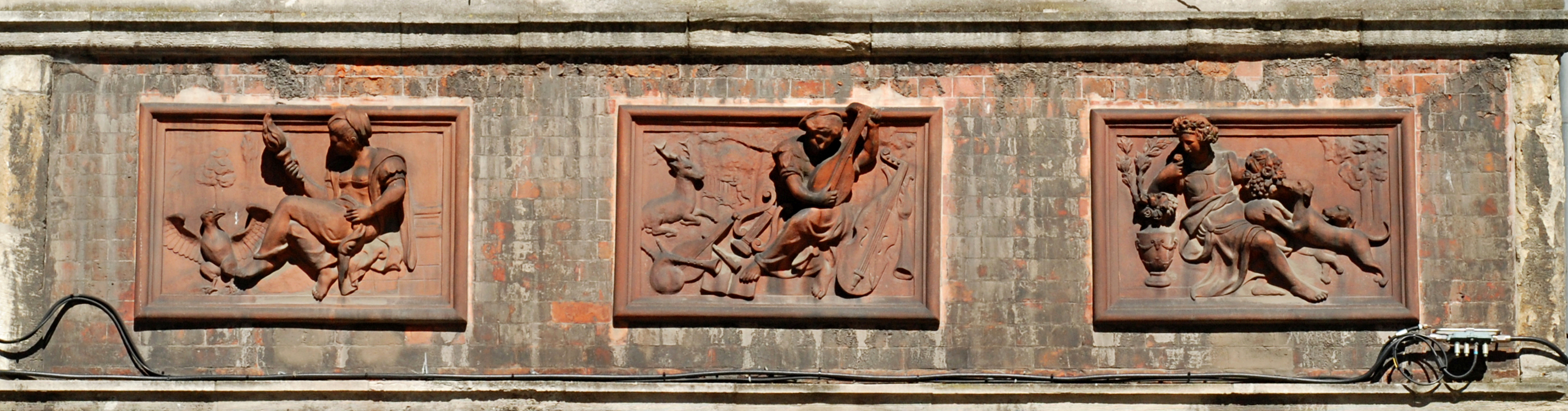 Belgique - Gand - Maison du Cerf Volant ou Maison du Flûtiste (Het Vliegend Hert ou De Fluitspeler, baroque, 1669)